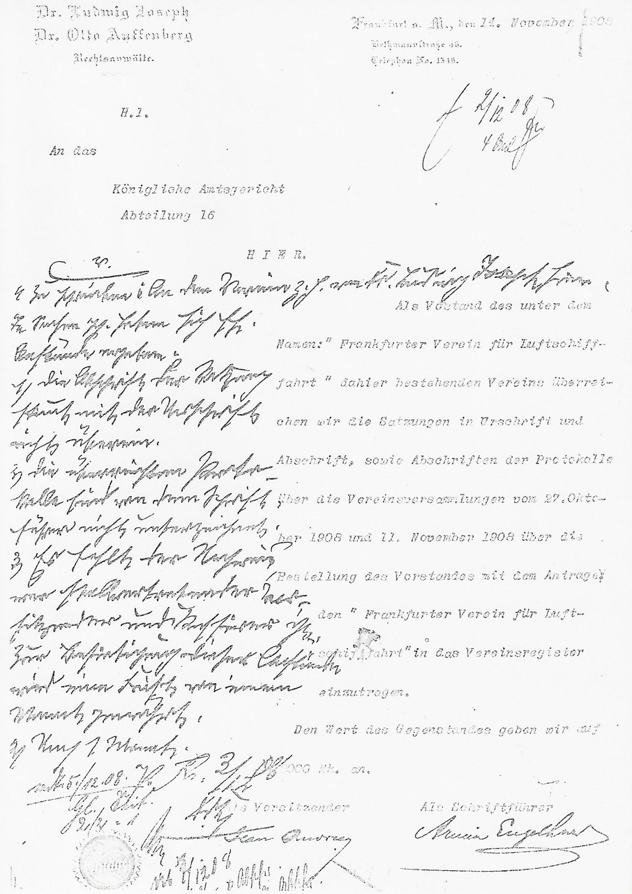 Die Gründungsurkunde des Frankfurter Vereins für Luftfahrt mit dem Stempel der Eintragung beim königlichen Amtsgericht Frankfurt